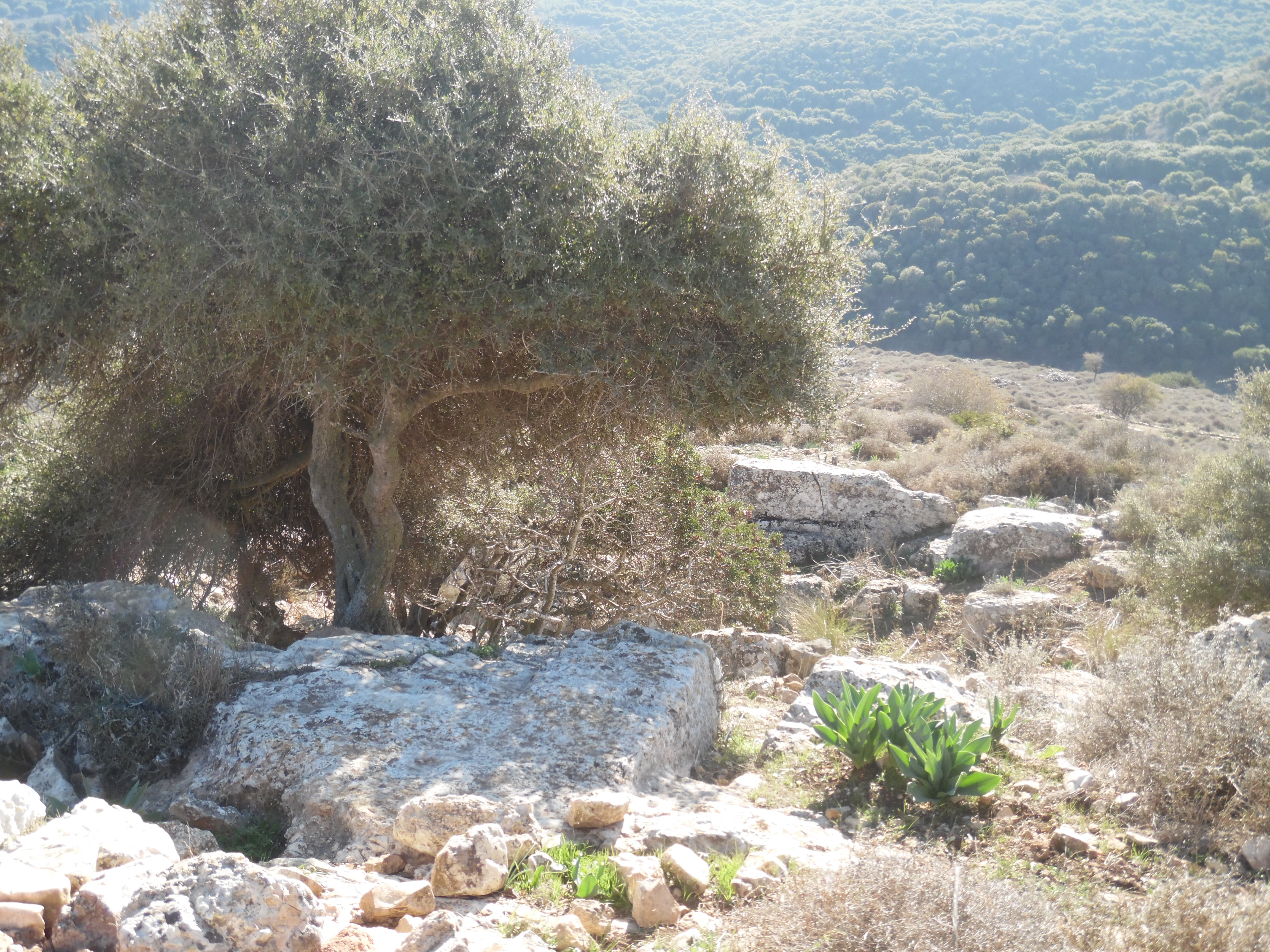 הר עצמון נוף טיפוסי